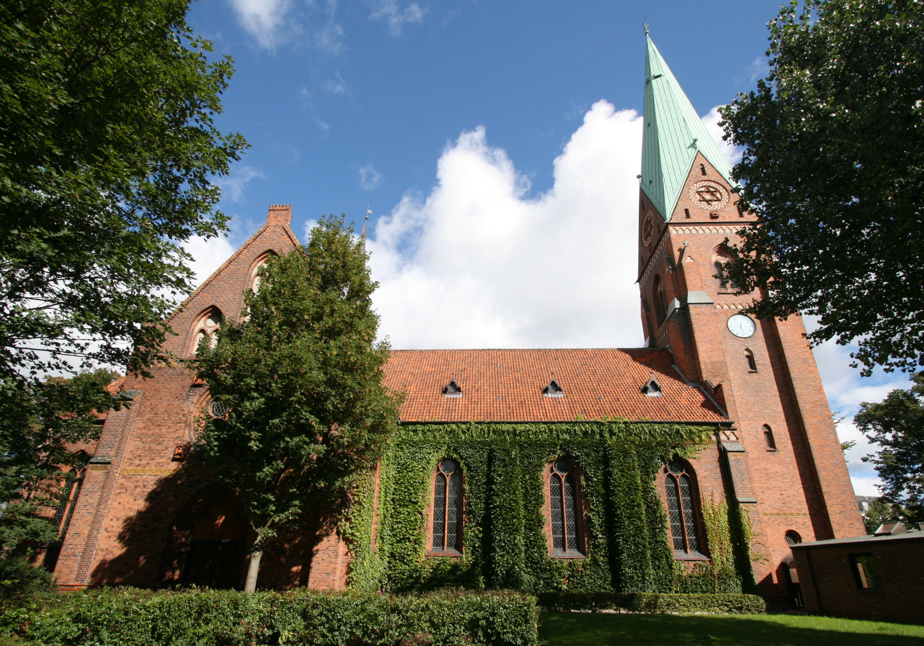 Hellig Kors Kirke, Copenhagen, Denmark. From south